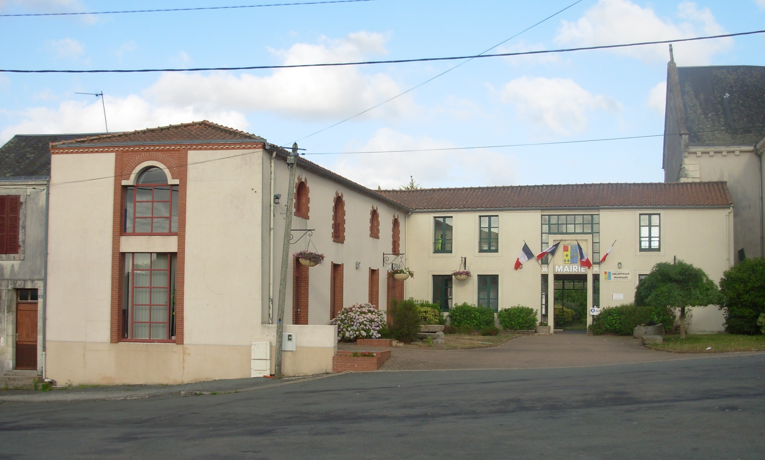 Hôtel de ville de Saint-Florent-des-Bois (Vendée)